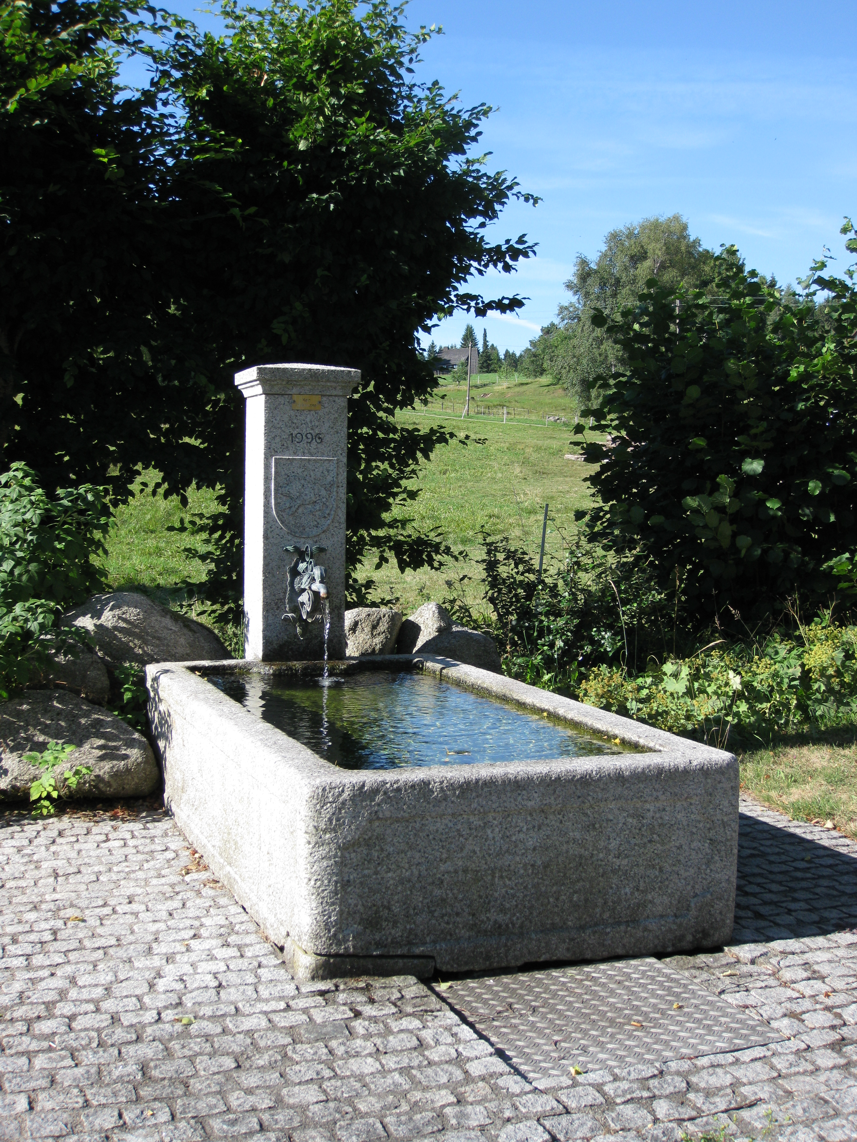 Dorfbrunnen auf dem Dorfplatz in Ebnet mit dem Wappen von Ebnet. (Stadtteil von Bonndorf im Schwarzwald)